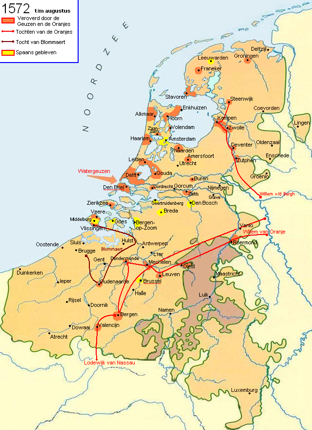 Krijgsbewegingen in de tachtigjarige Oorlog. 1572 t/m augustus (versie 2).